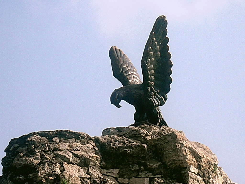 орёл